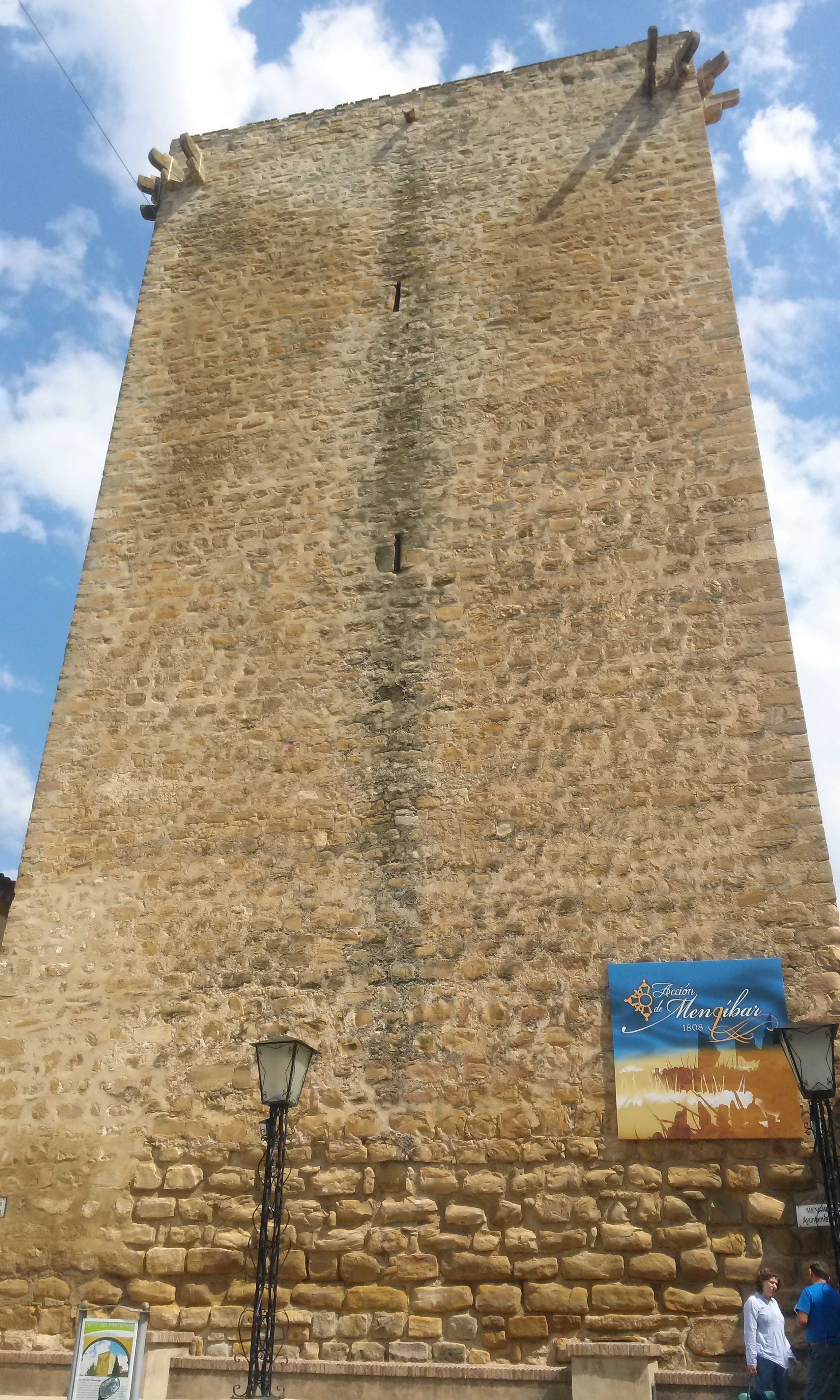 La Torre de Mengíbar.